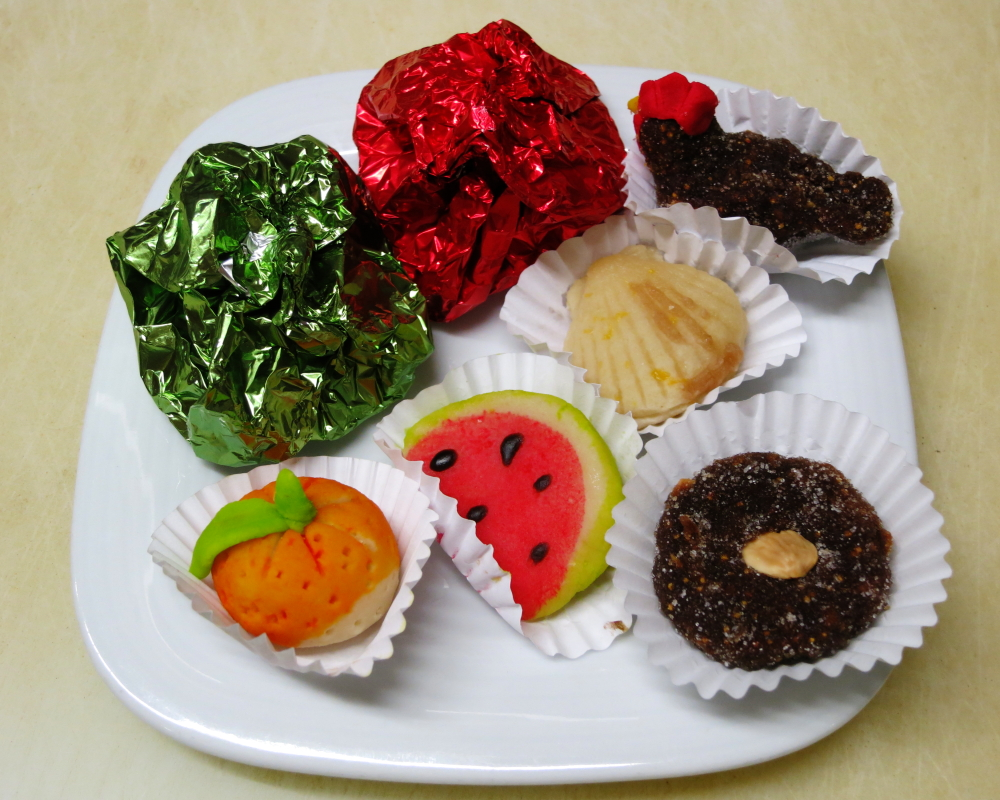 Doces do Algarve (D. Rodrigo, doces de amêndoa e de figo)